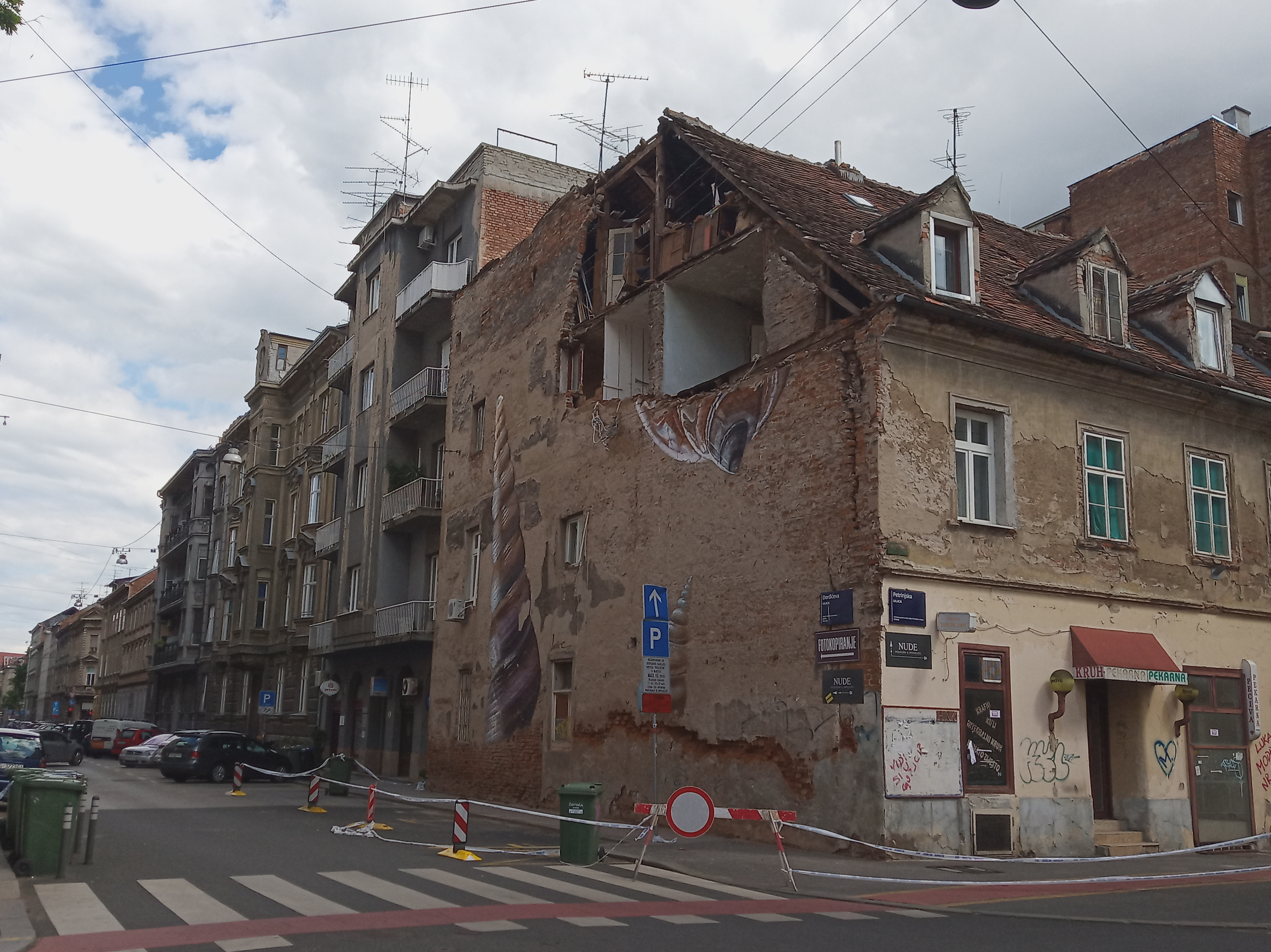 Oštećena zgrada u Đorđićevoj.